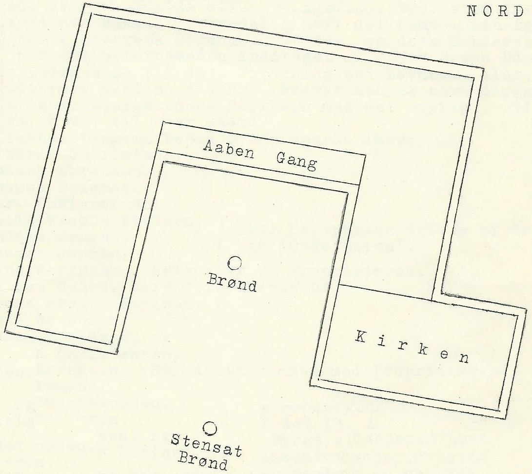 Essenbæk Kloster's sandsynlige grundplan.